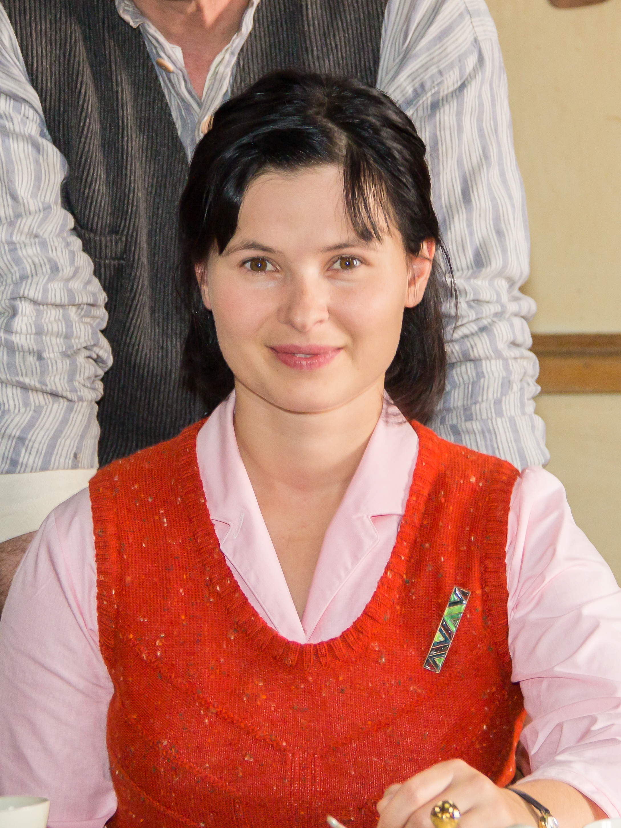 Settermin zum Drehstart für „Aufbruch". WDR/ARD-Degeto-Verfilmung von Ulla Hahns gleichnamigem Roman In der Kulissenwohnung: Anna Fischer spielt die Hilla Palm